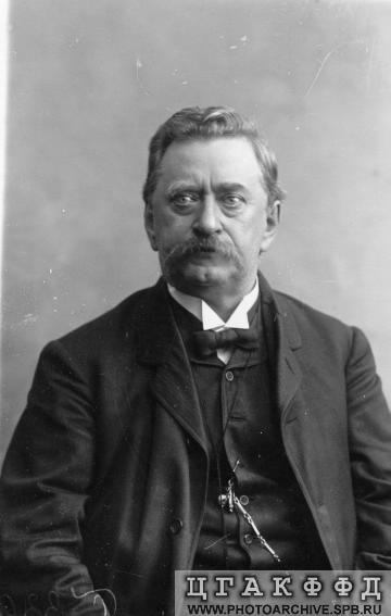 Депутат Государственной думы 4-го созыва от Калишской губернии Альфонс Ипполитович Парчевский.